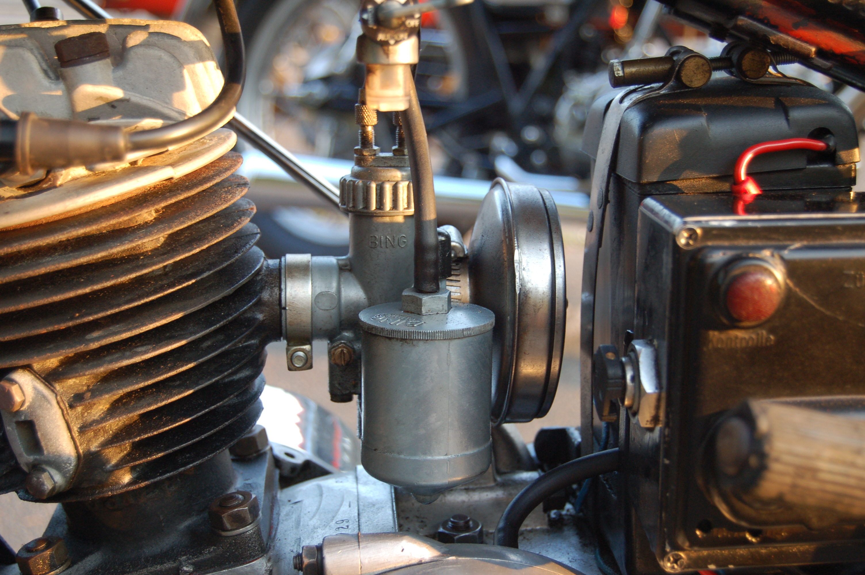 Bing-Vergaser an einer DKW SB 200 Baujahr 1938. fotografiert beim Oldtimertreffen in Uetersen.